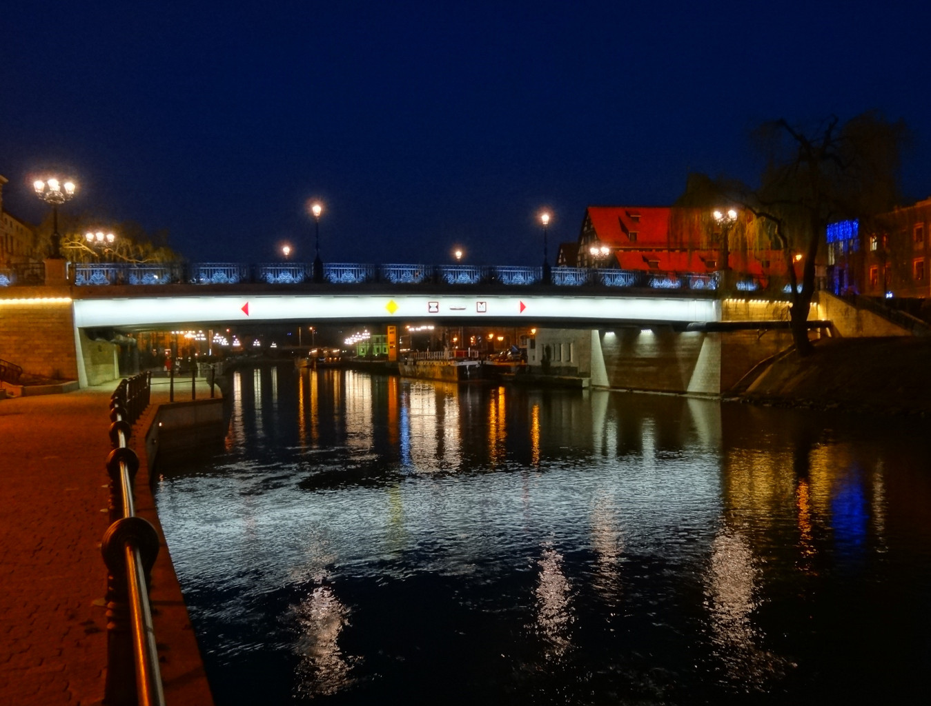 Most Staromiejski im. Jerzego Sulimy-Kamińskiego w Bydgoszczy